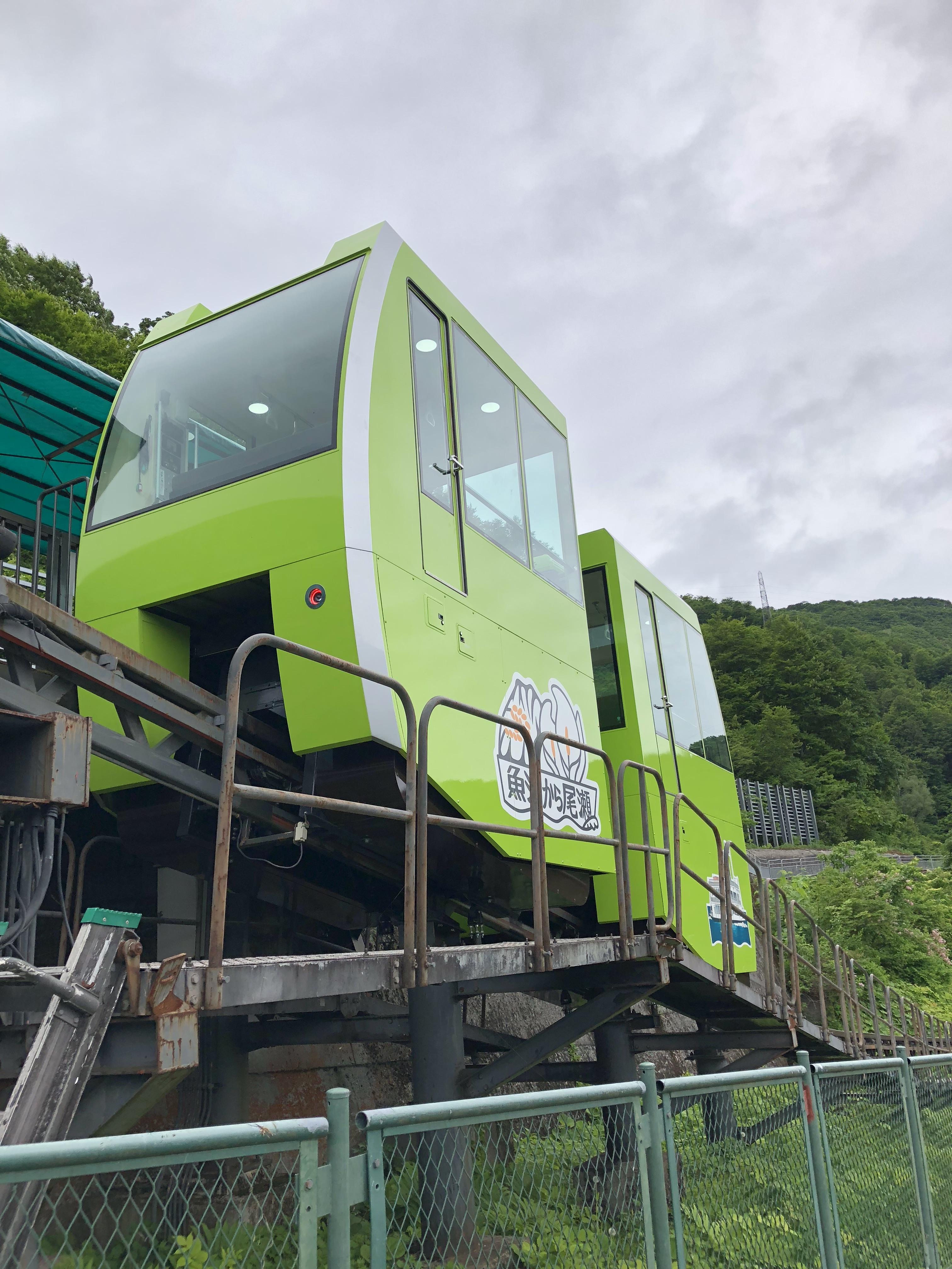 奥只見スロープカー（新潟県魚沼市奥只見ダム）